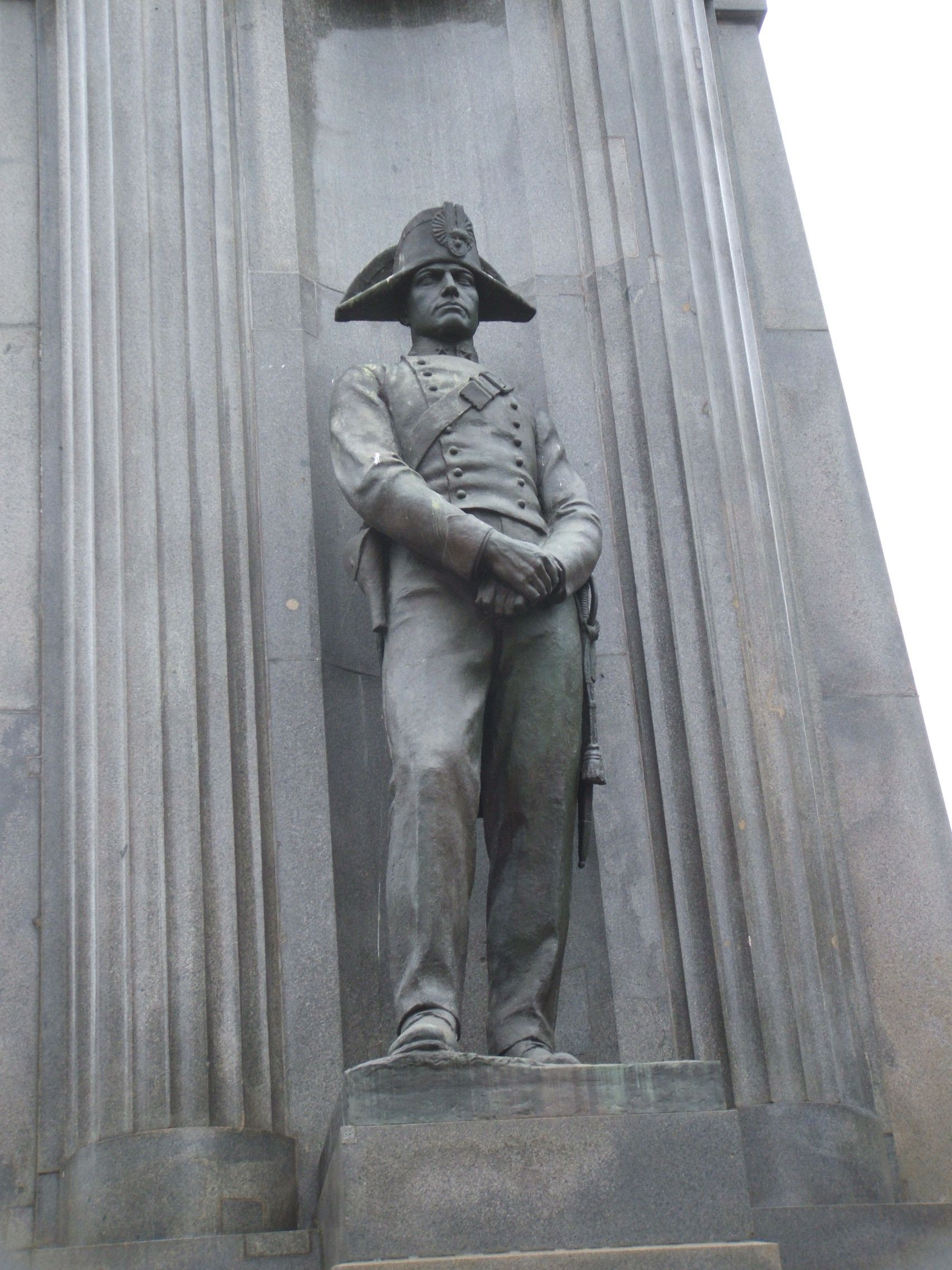 Monumento Nazionale al Carabiniere, 6 giugno 2008.